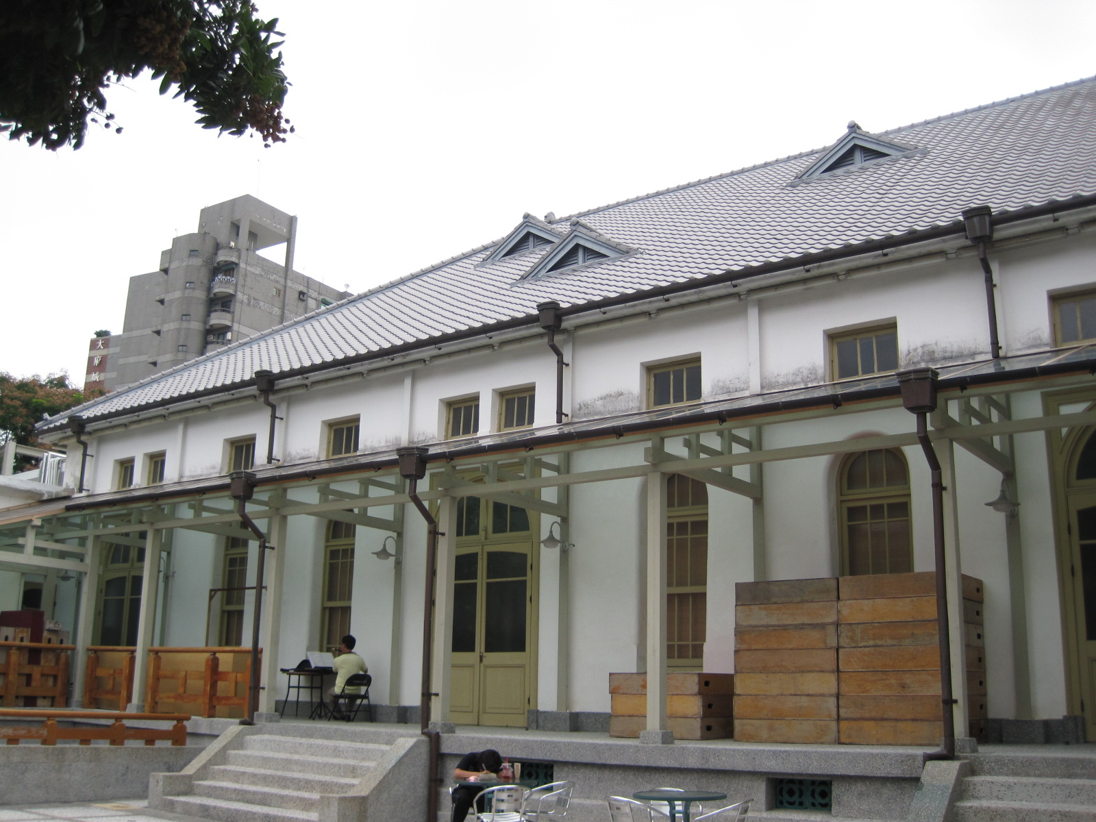 台南公會堂後棟